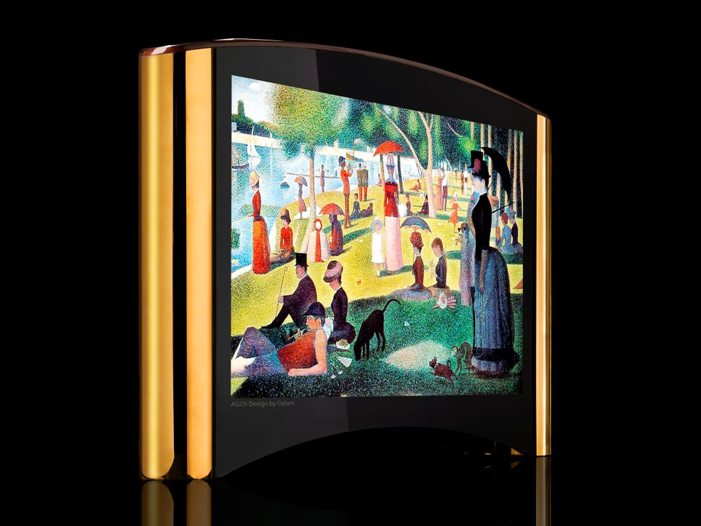 AGOS Luxus Computerserie, Opus Magnum, showing Georges Seurat's Un dimanche après-midi à l'Île de la Grande Jatte